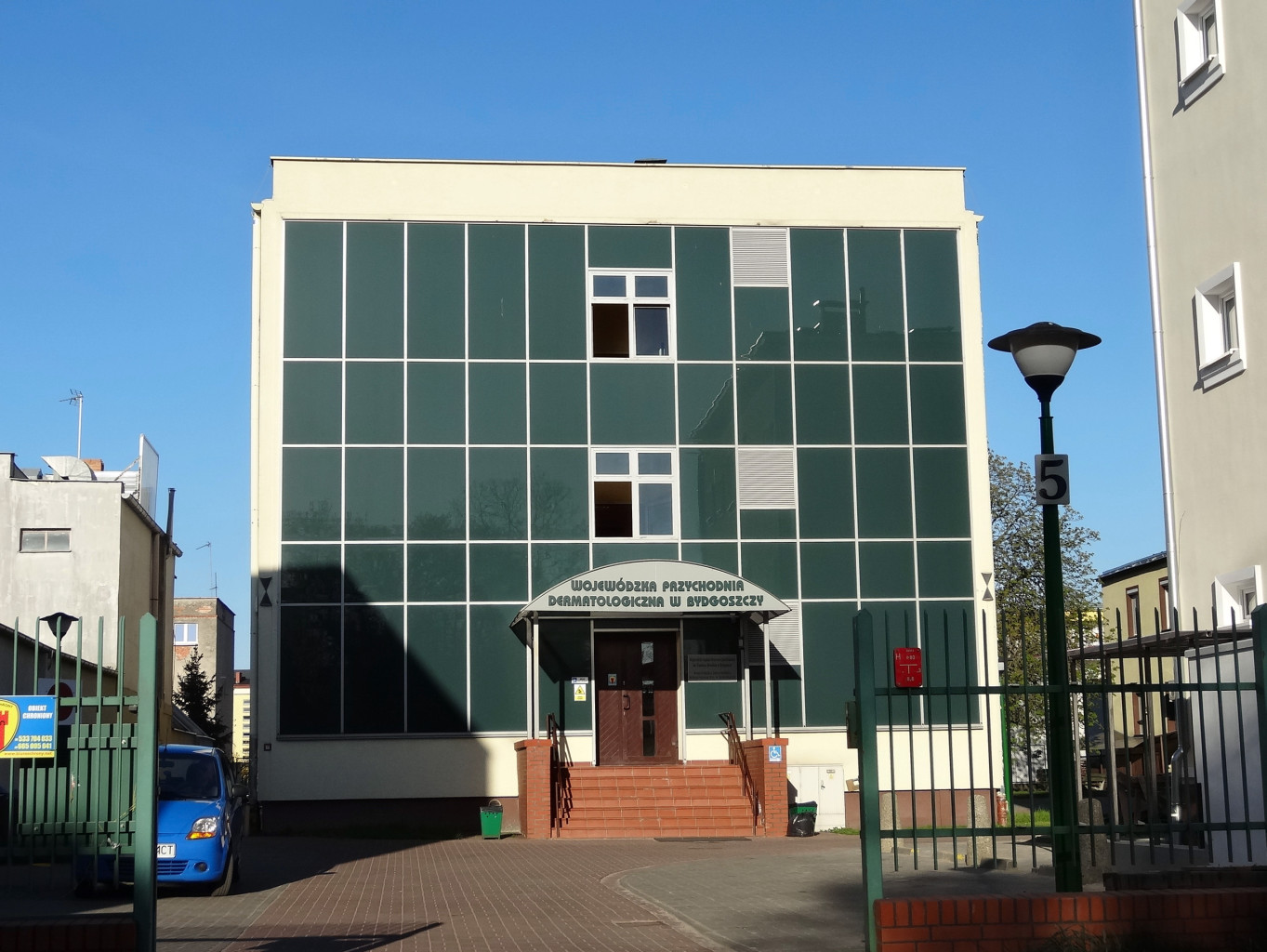 Wojewódzka Przychodnia Dermatologiczna w Bydgoszczy, ul. Karola Kurpińskiego 5